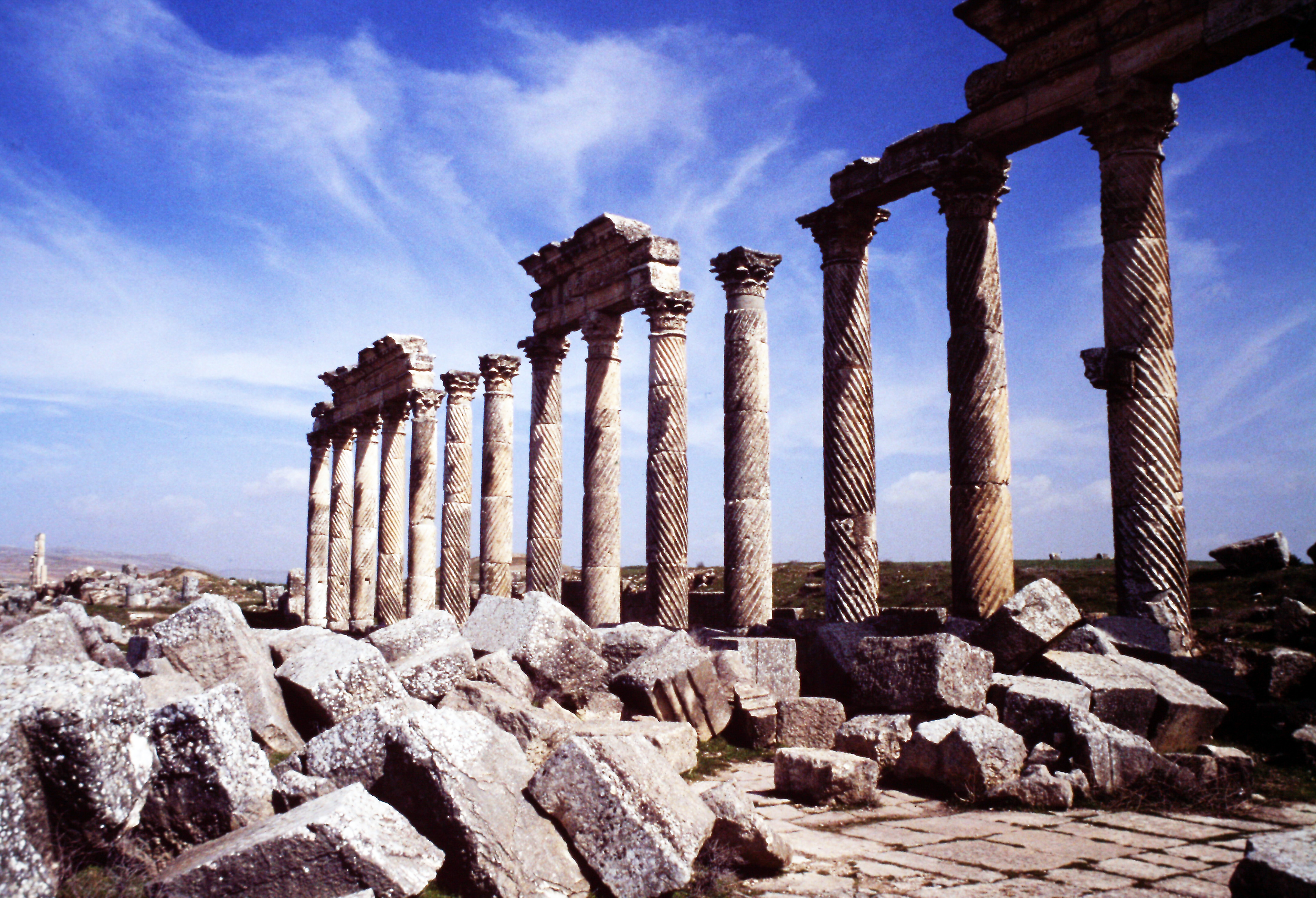 Apamea, 1993